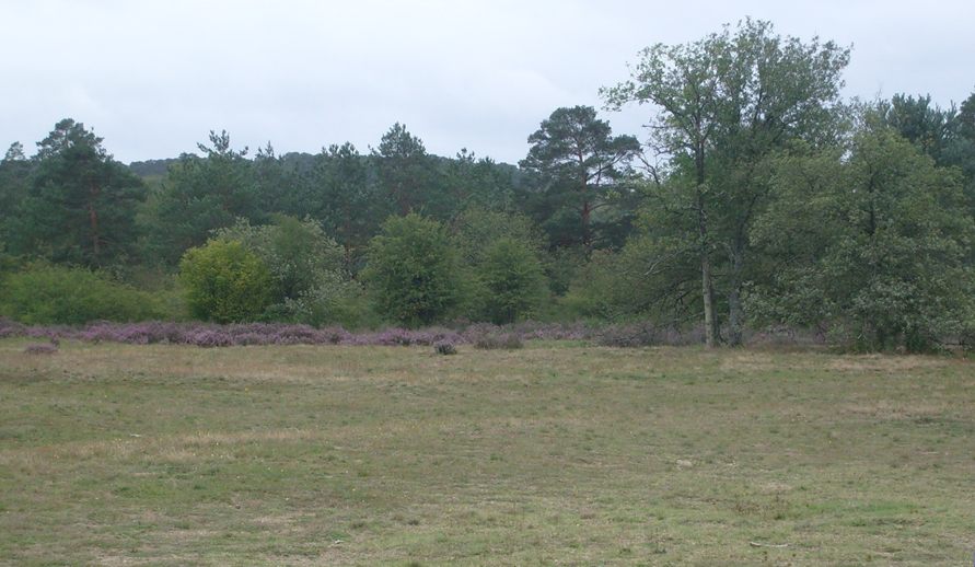 Photographie de la lande de la forêt de Fontainebleau.